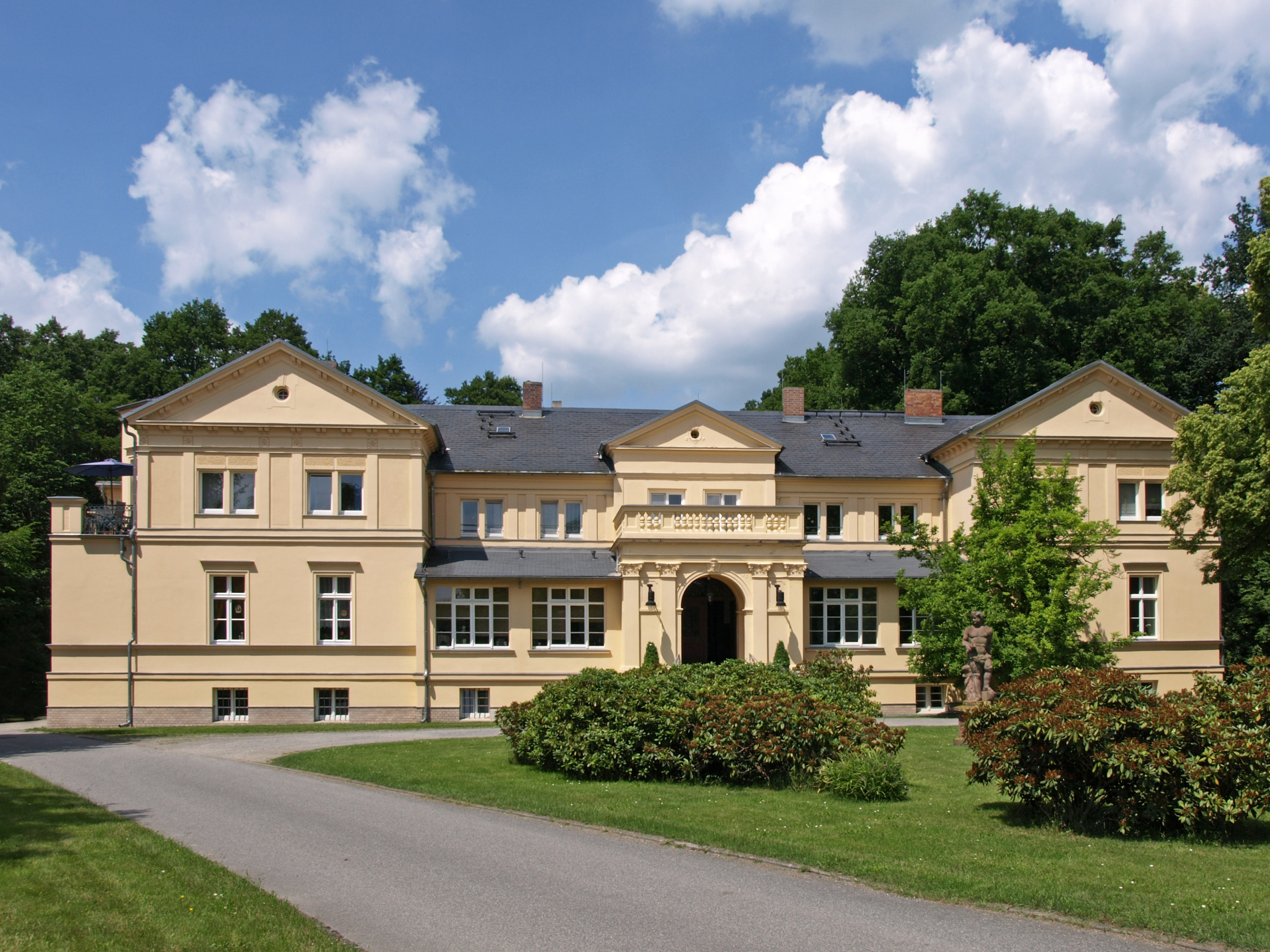 Herrenhaus in Hornow